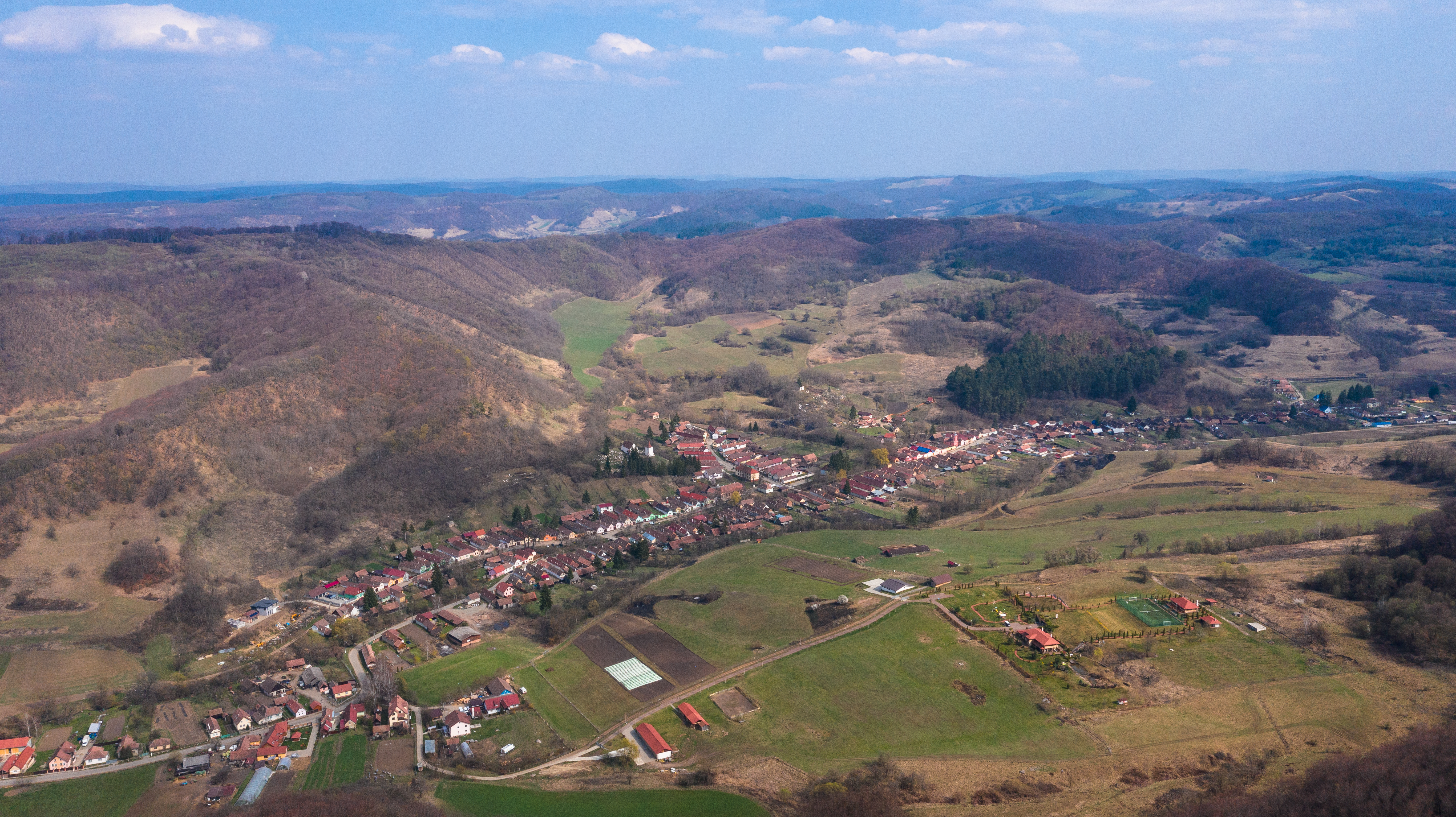 Luftbild von Neudorf bei Schäßburg (April 2019). Unknown language: Nou Sasesc, fotografie aeriana (Aprilie 2019).